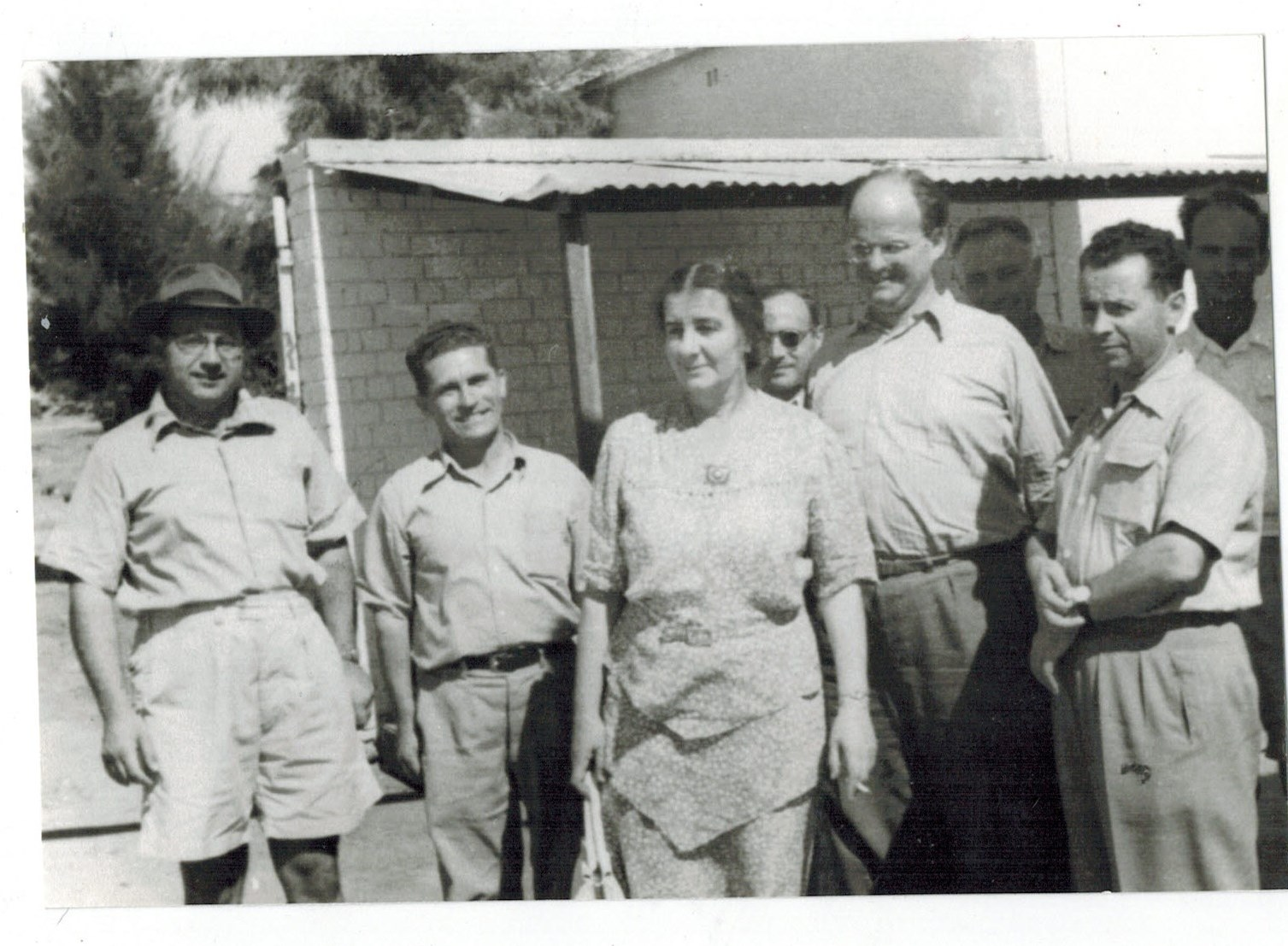 משולם עם שרת העבודה הגב' גולדה מאיר בביקור במחנה עולים